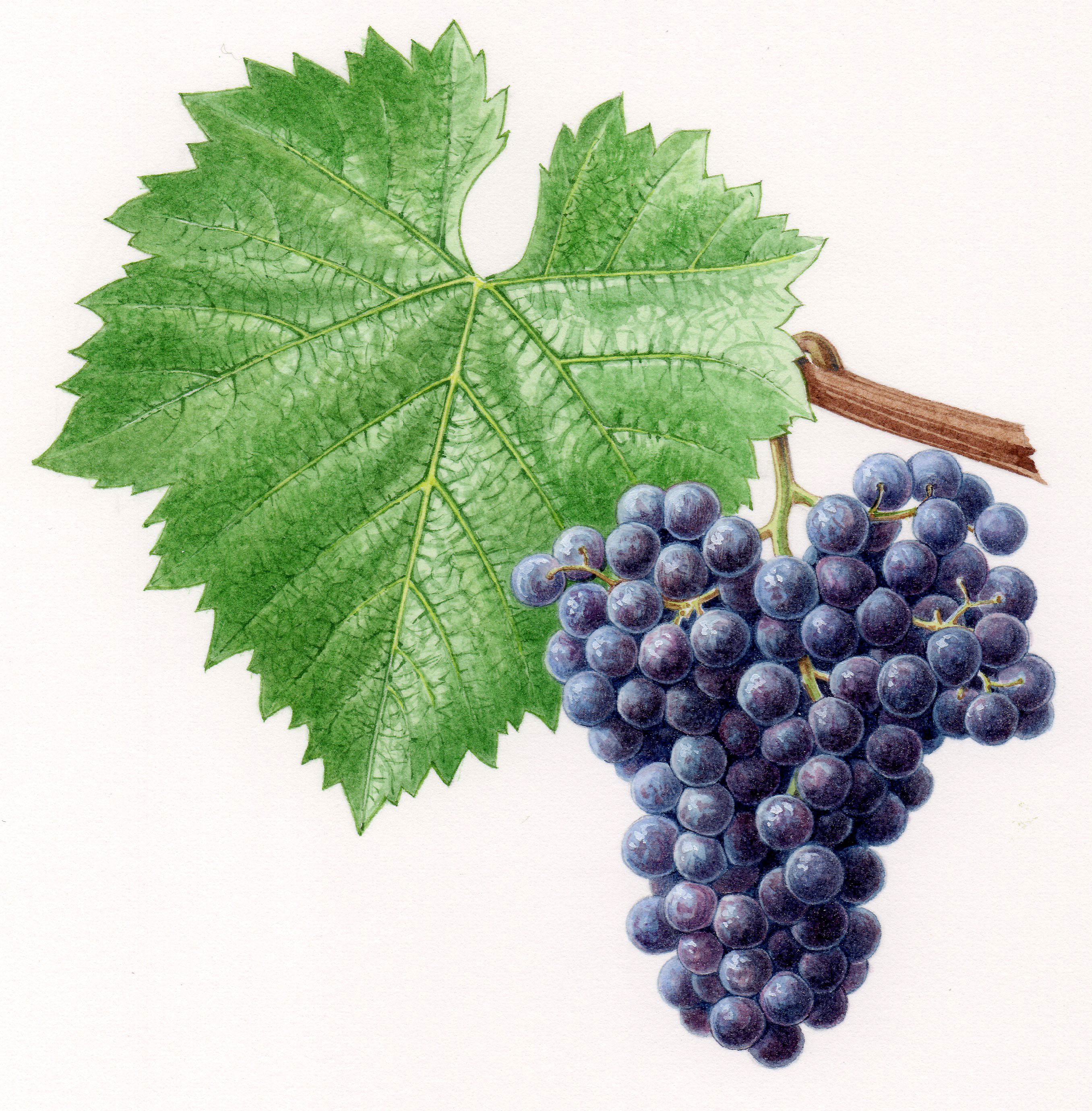 Aquarelles originales pour le Cépages de France (2001)